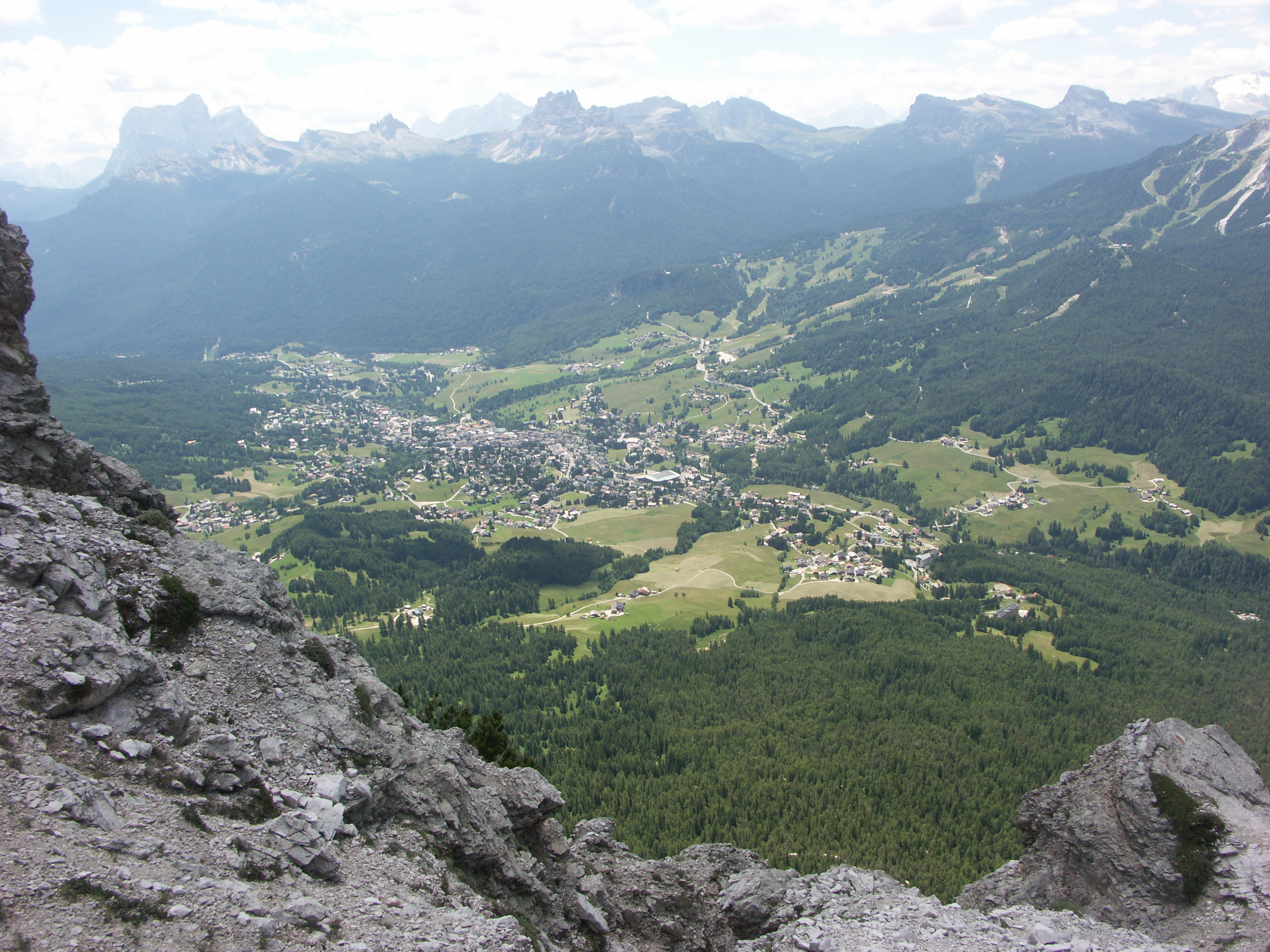 Italien, Alpen, Dolomiten, Gesamtansicht Cortina d'Ampezzos von der Forc. de Zumeles (2.075 m), südöstlich der Corda Pomaganon (2.450 m)